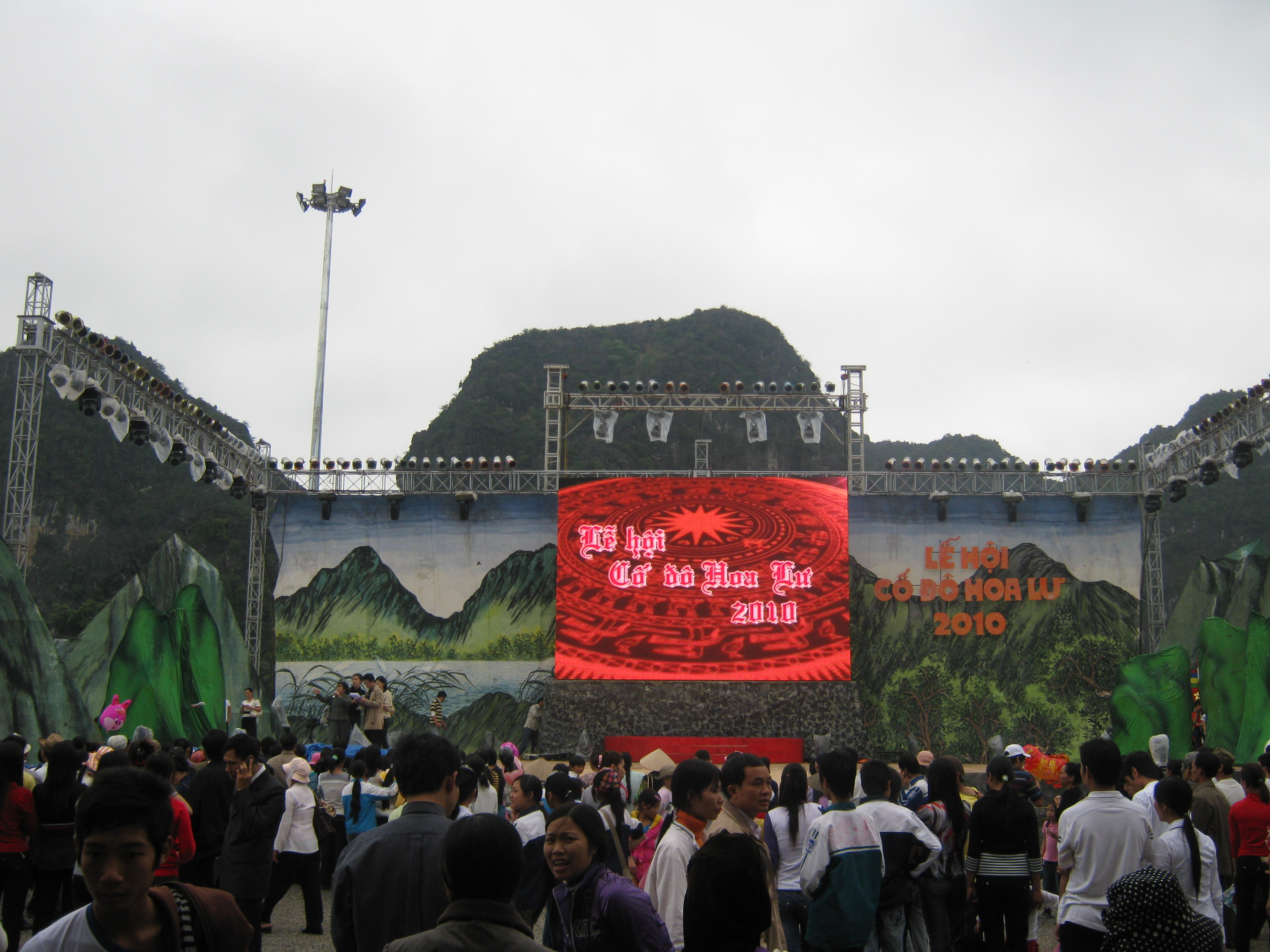 cố đô Hoa Lư và lễ hội cố đô Hoa Lư 2010